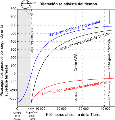 Variación del tiempo por efectos relativistas en los satélites en órbita. Trabajo inspirado en el archivo Orbit_times.png de P. Fraundorf